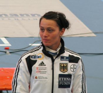 Marijana Markovic beim Preis der Quadratestadt Mannheim 2013.